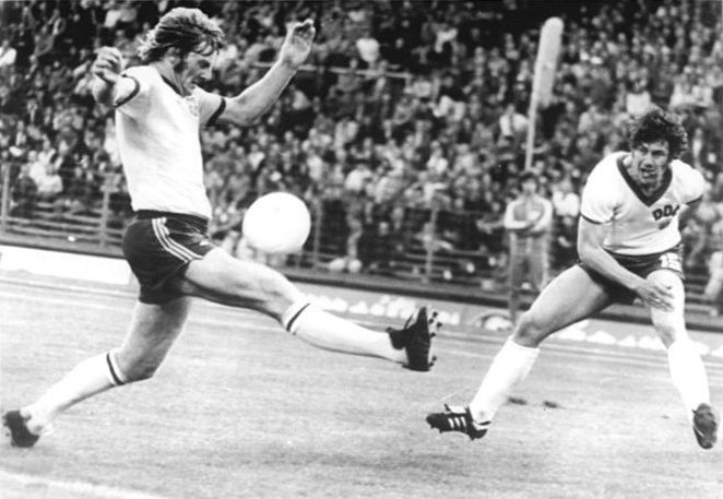 ADN-ZB-Mittelstädt-Tele-14.6.74-ma-BRD-Hamburg: X. Fußball-Weltmeisterschaft-1. Finalrunde, Gruppe 1: DDR - Australien 2:0- DDR-Stürmer Eberhard Vogel (rechts) schießt auf das Tor von Australien. Verteidiger Douglas Utjesenevic (Australien) kann nicht mehr eingreifen.